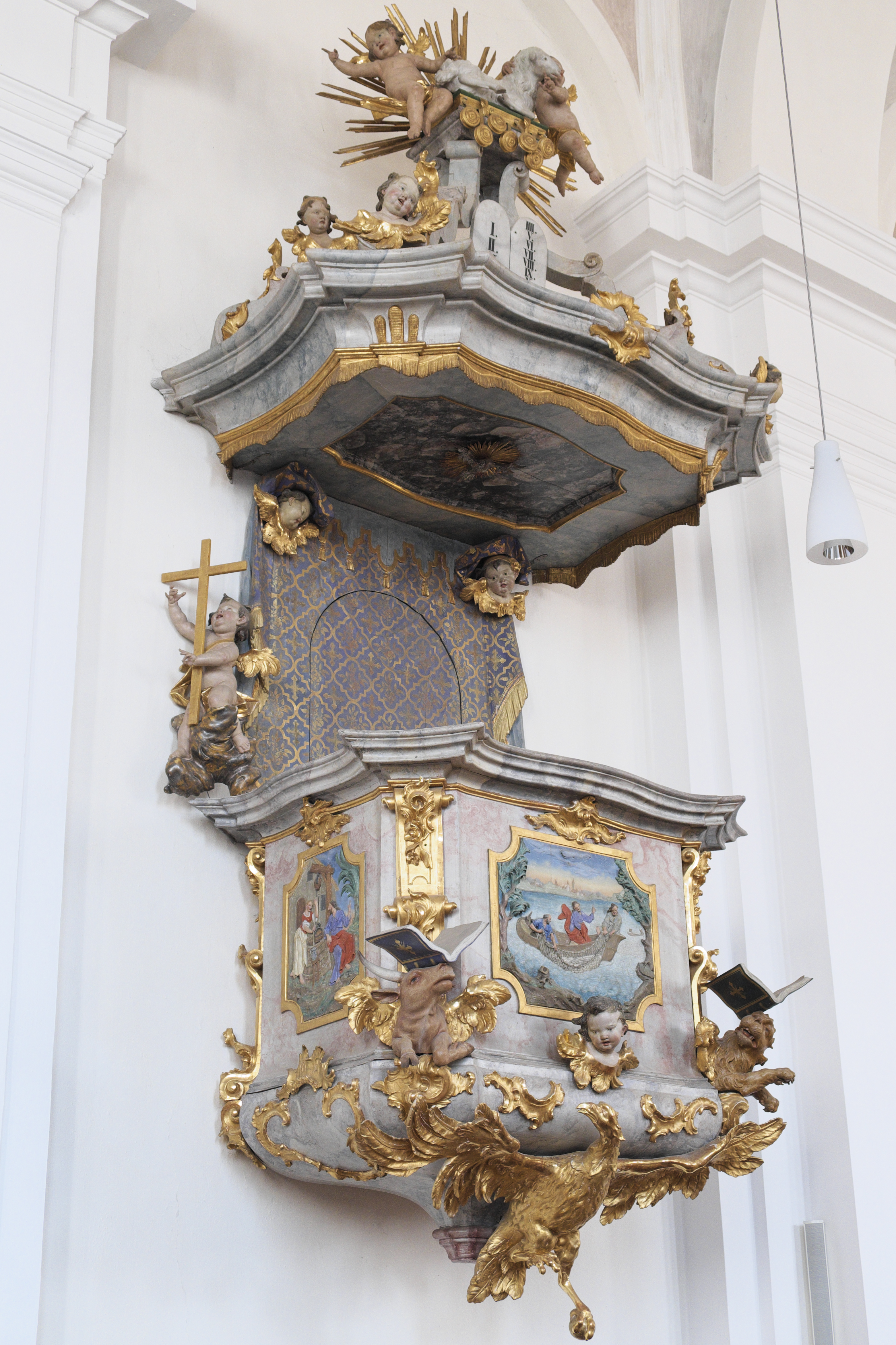 Katholische Pfarrkirche St. Michael in Reichenkirchen (Fraunberg) im Landkreis Erding (Bayern/Deutschland), Kanzel von 1759